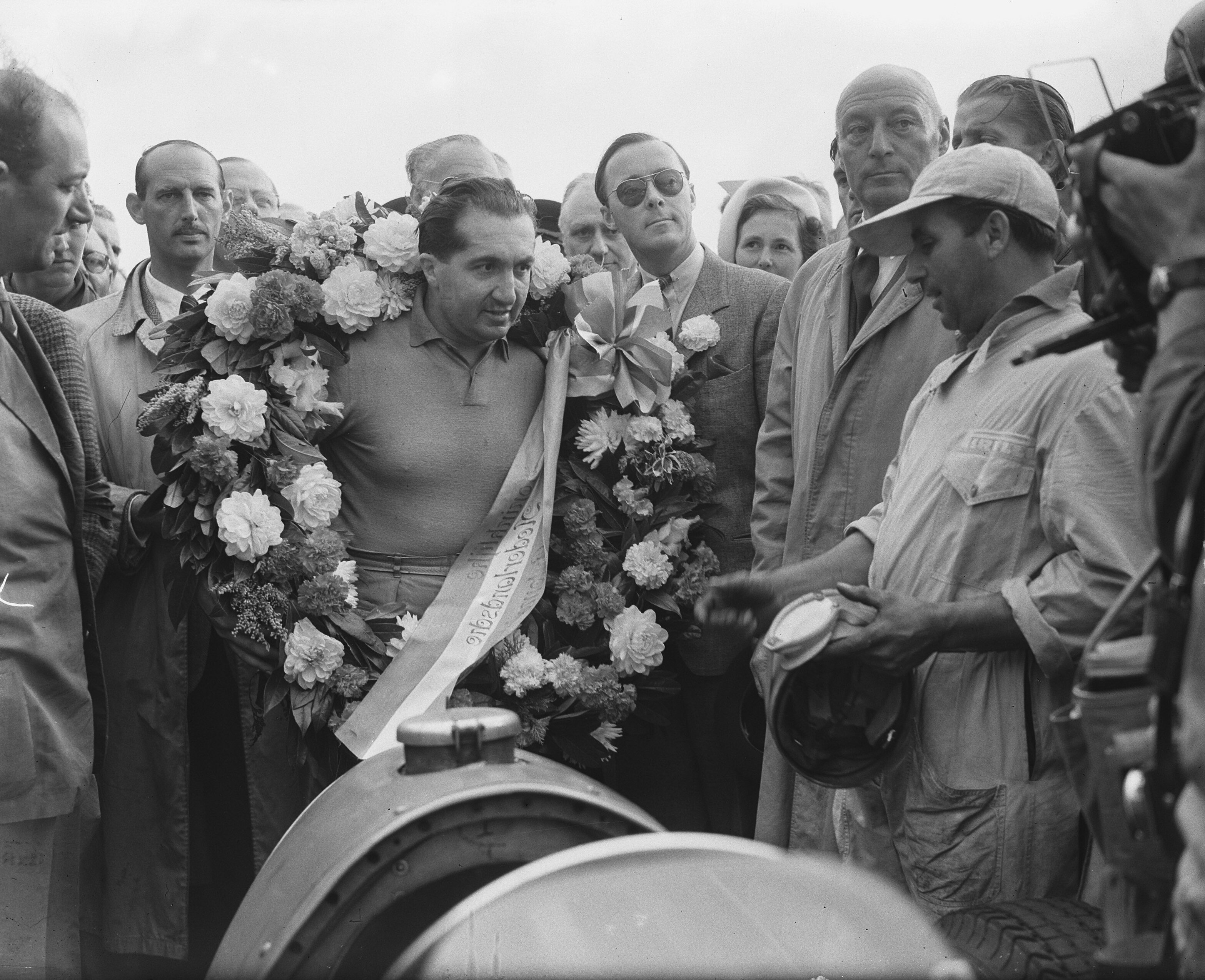 Collectie / Archief : Fotocollectie Anefo Reportage / Serie : [ onbekend ] Beschrijving : Grote Prijs Nederlandse autoraces Zandvoort. Winnaar Askari en Z. K. M. de Prins Bernhard Datum : 17 augustus 1952 Locatie : Noord-Holland, Zandvoort Trefwoorden : AUTORACES, PRIJS, Winnaars Persoonsnaam : Bernhard, prins Fotograaf : Bilsen, Joop van / Anefo Auteursrechthebbende : Nationaal Archief Materiaalsoort : Glasnegatief Nummer archiefinventaris : bekijk toegang 2.24.01.09 Bestanddeelnummer : 905-2688